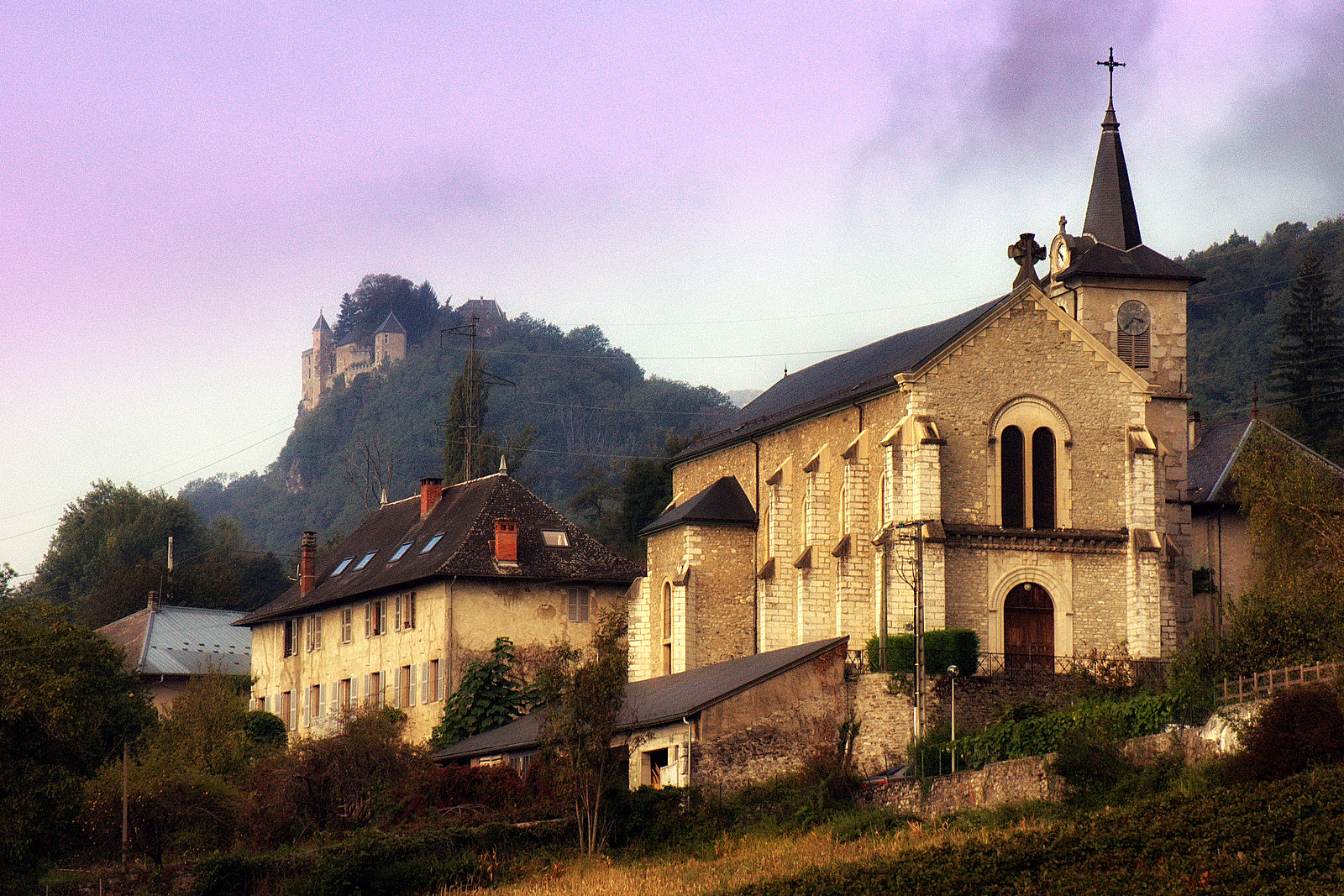 Eglise de Fréterive et Chateau de Miolans (Savoie)